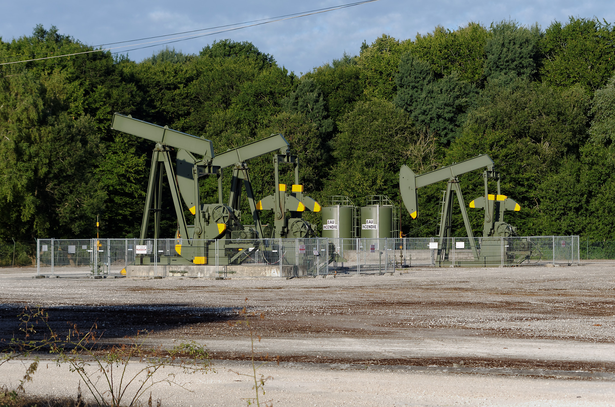 Chevalets de pompage (pumpjack) - Puit de pétrole à Sivry-Courtry